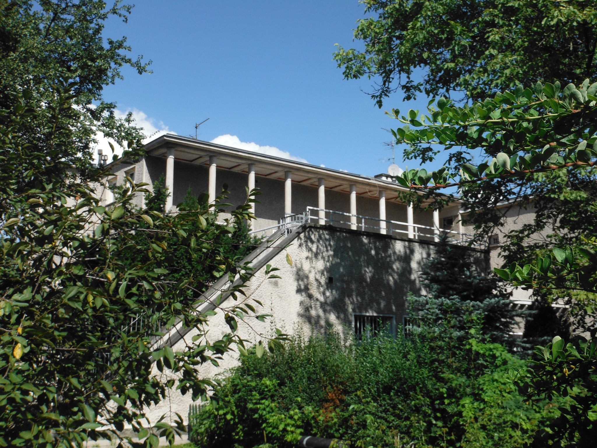 Willa Zalewskich przy ul. Rzymskiej w Warszawie, zaprojektowana przez Bohdana Pniewskiego.